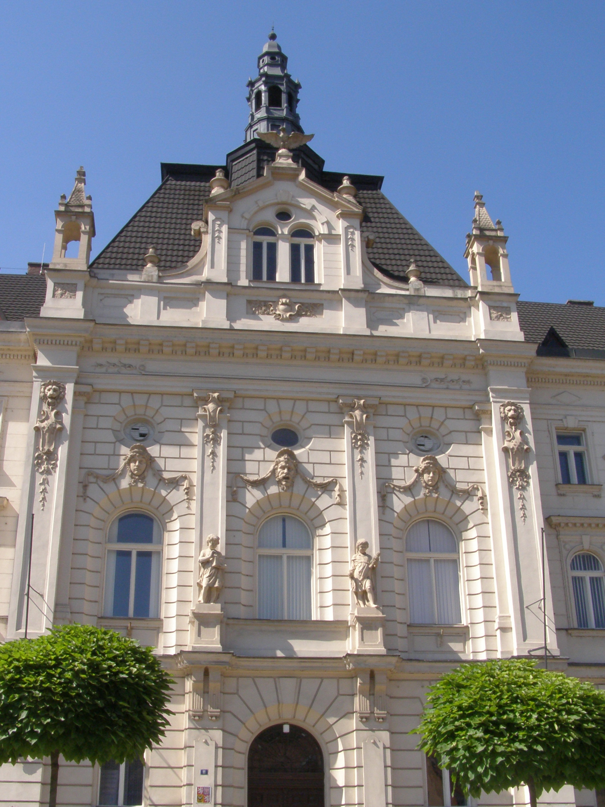 Místek, bývalá místecká radnice